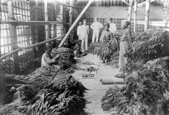 Negatief. Sortering van krossok (=gedroogde tabaksbladeren), Java